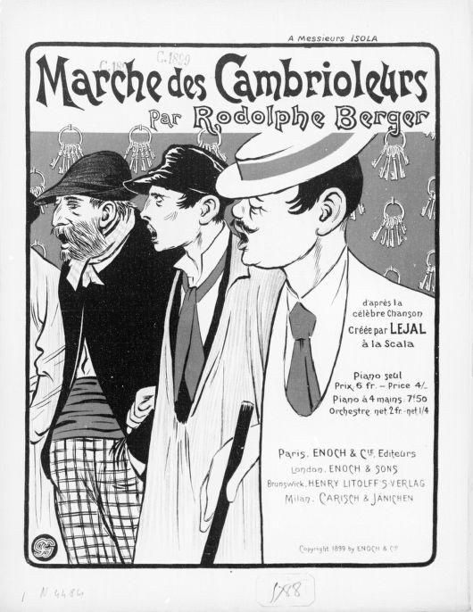 Couverture de la partition pour piano de la Marche des Cambrioleurs.